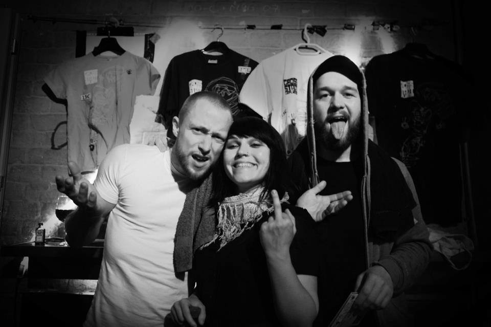 Fan Foto am Merchstand